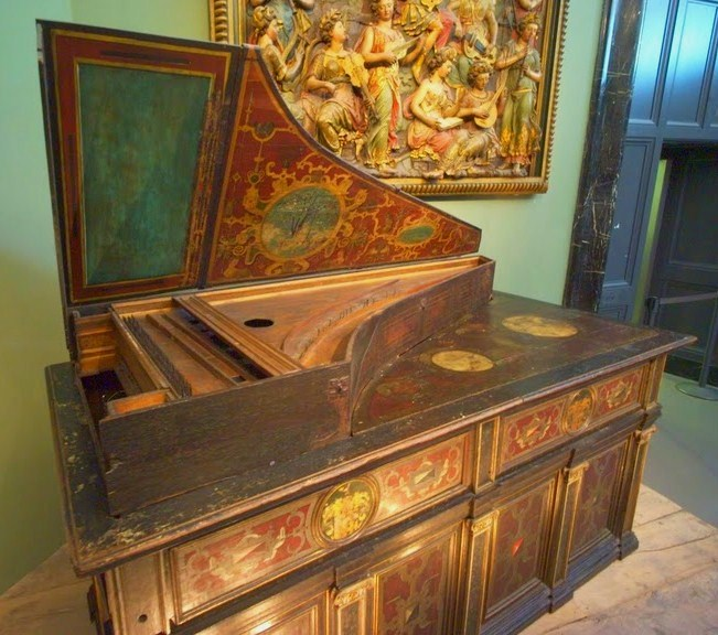 Clavecin organisé (ou claviorganum) de Lodewijk Theeuwes (Londres, 1579) - Londres, Victoria an Albert Museum